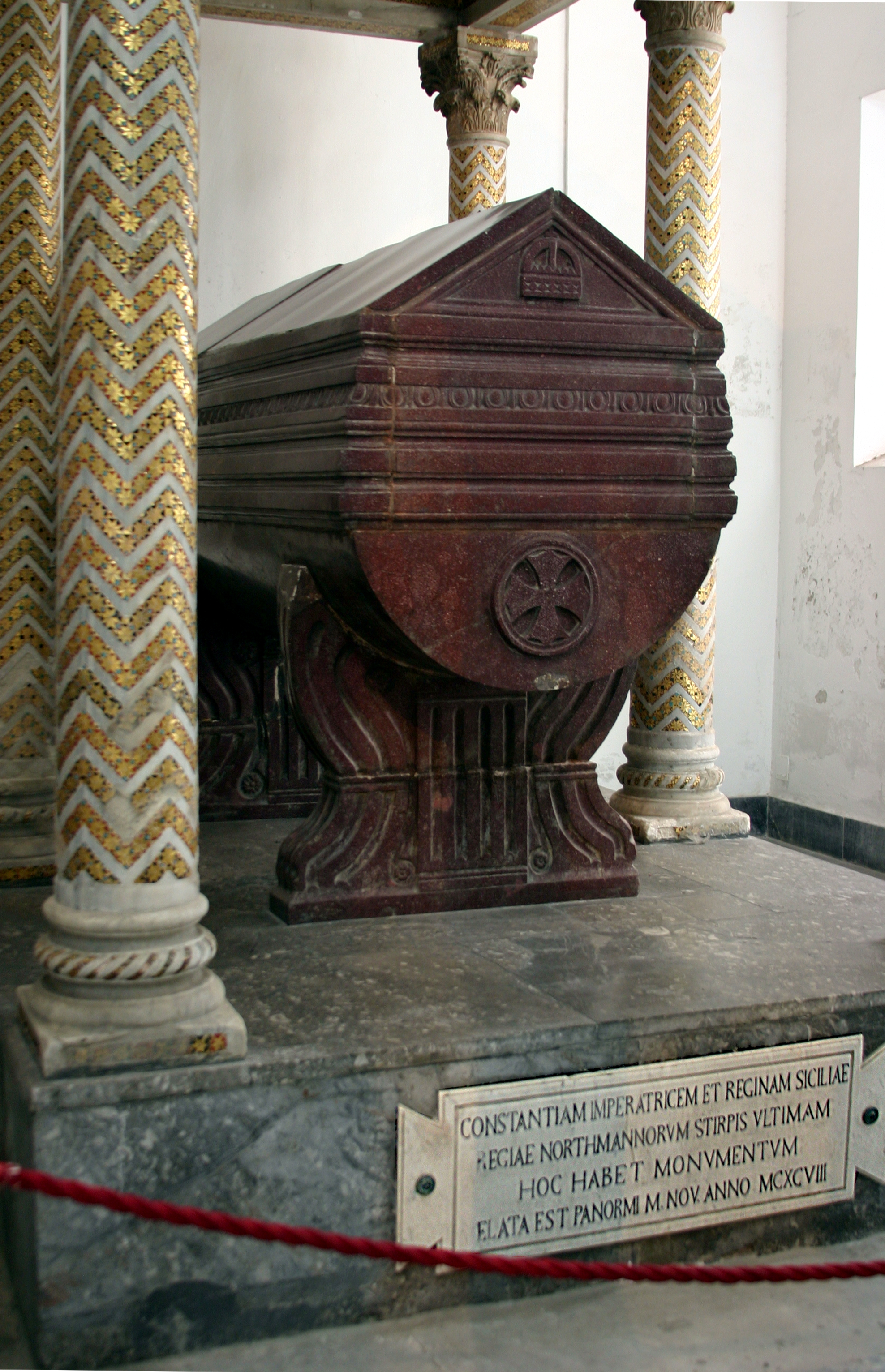 Cathedral of Palermo